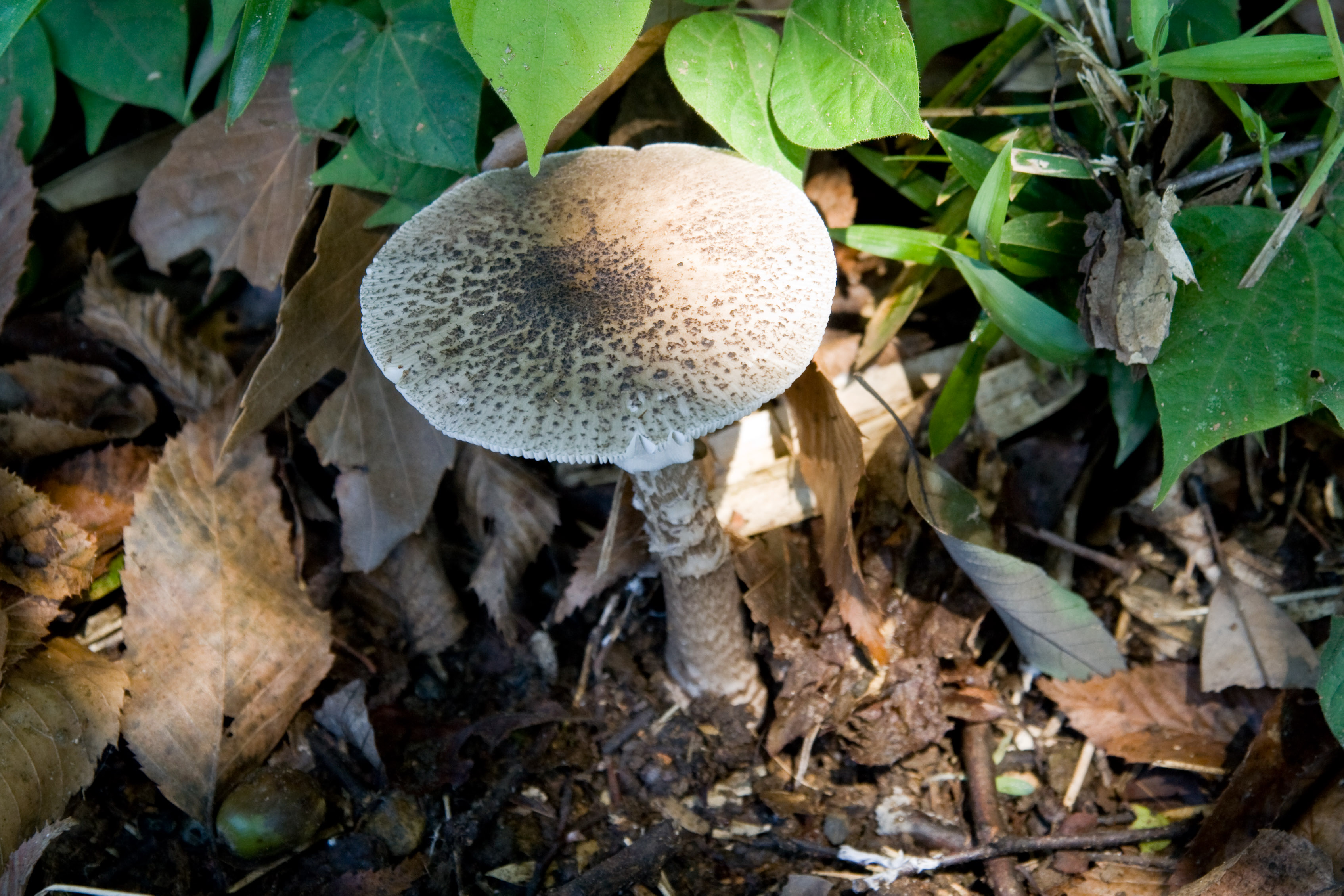 ヘビキノコモドキ (学名:Amanita spissacea)